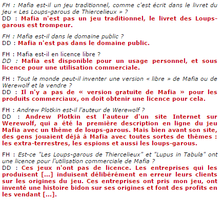 Screenshoot